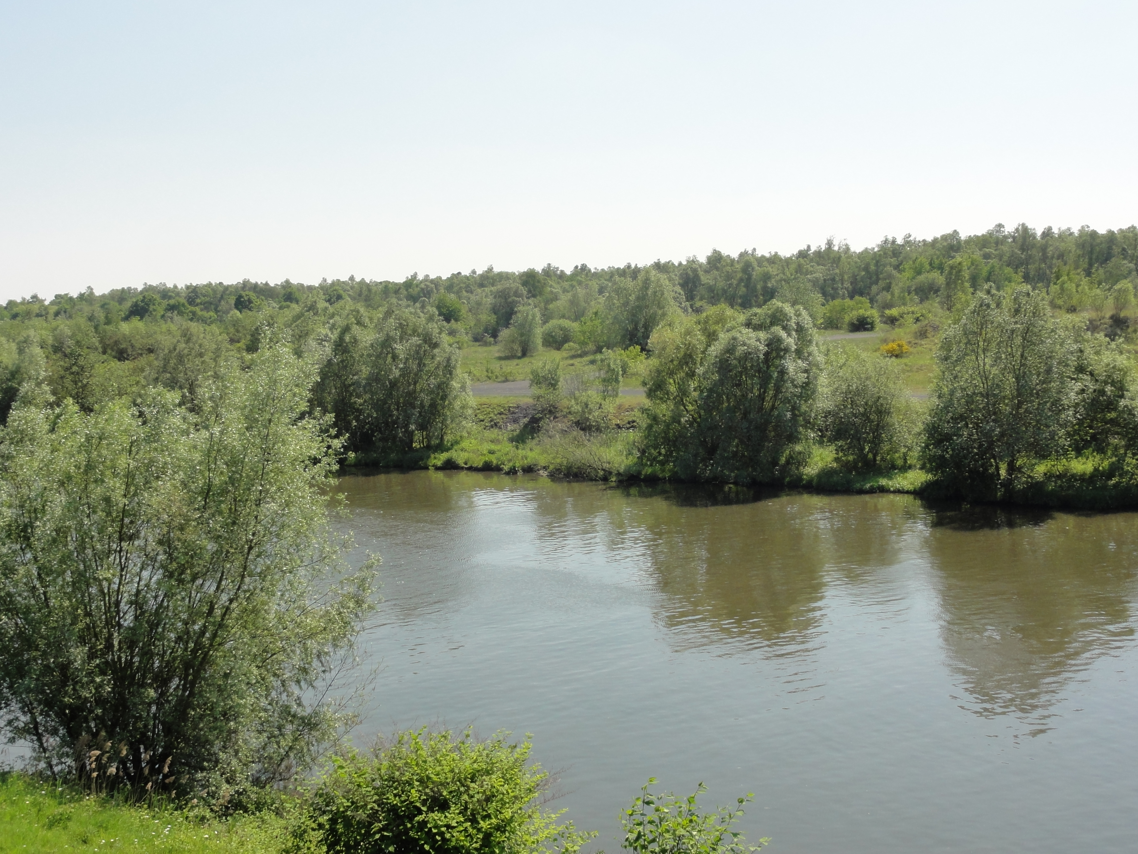 Terril n° 190 dit Pont du Sarteau, Fosse Sarteau de la Compagnie des mines d'Anzin, Fresnes-sur-Escaut, Nord, Nord-Pas-de-Calais, France.